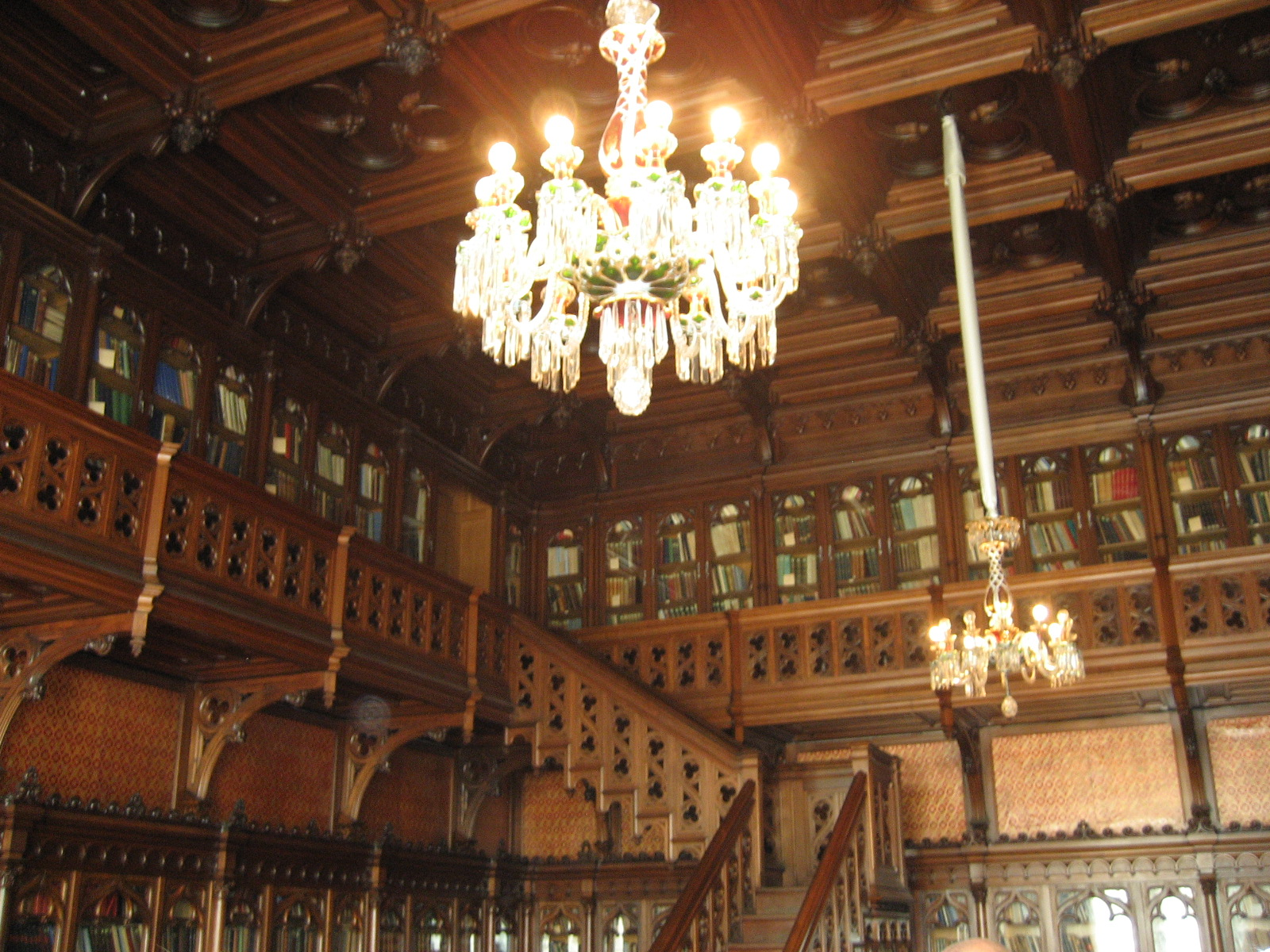 Winter Palace, Saint Petersburg